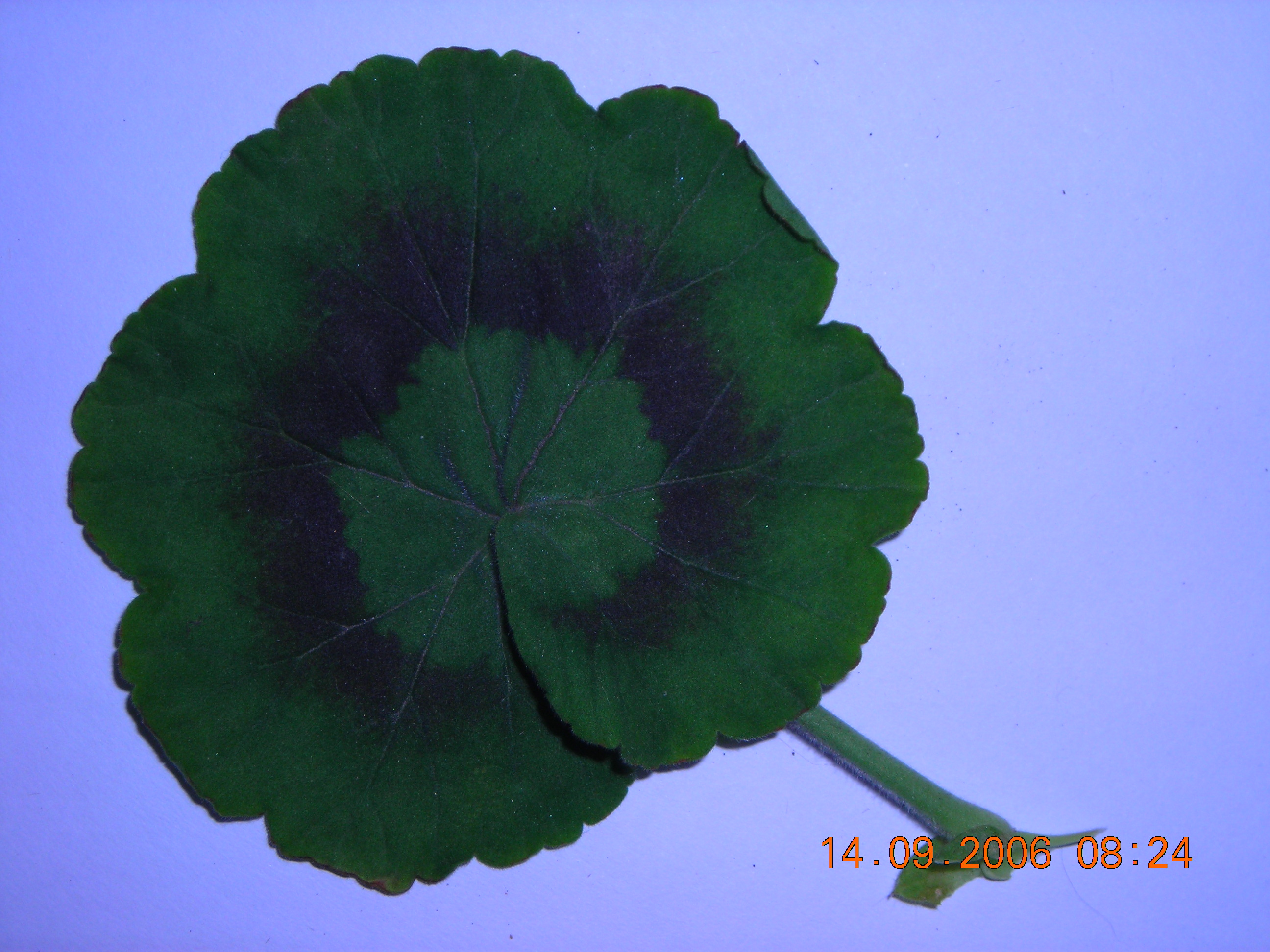 Fotografia de hoja de pelargonium hortorum en su cara anterior